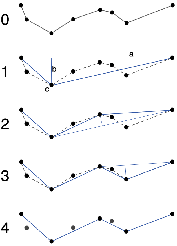 Linienglättung nach dem Douglas-Peucker-Algorithmus, nach Bonham-Carter (Geographic information systems for geoscientists. 1994)